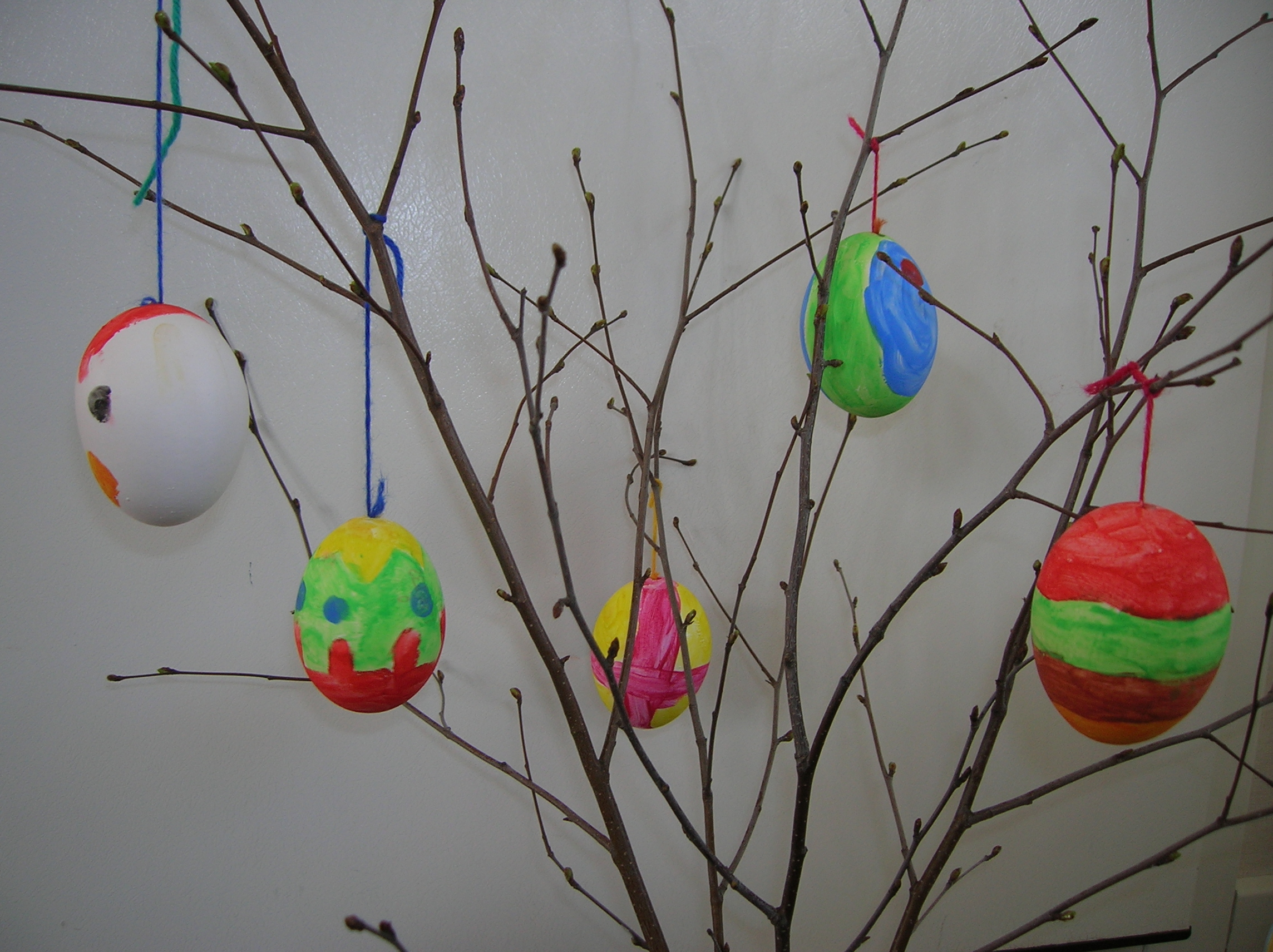 Painted easter eggs